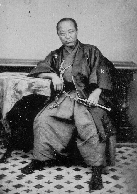 毛利元純。Mouri Motozumi.ガラス原板。